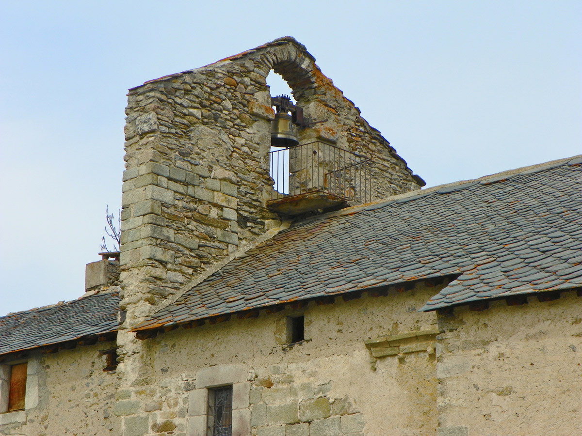 Campanar de l'església de Vià (Alta Cerdanya)